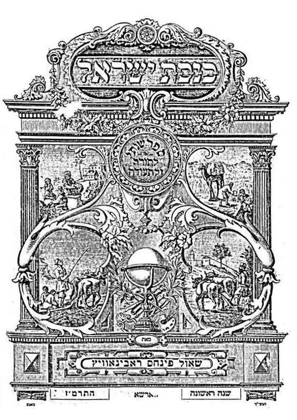 כנסת ישראל לשפ"ר, שנה ראשונה, ה'תרמ"ז